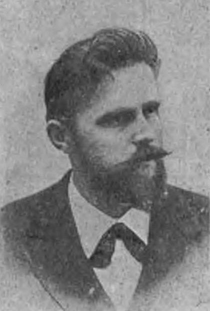 Wacław Wolski